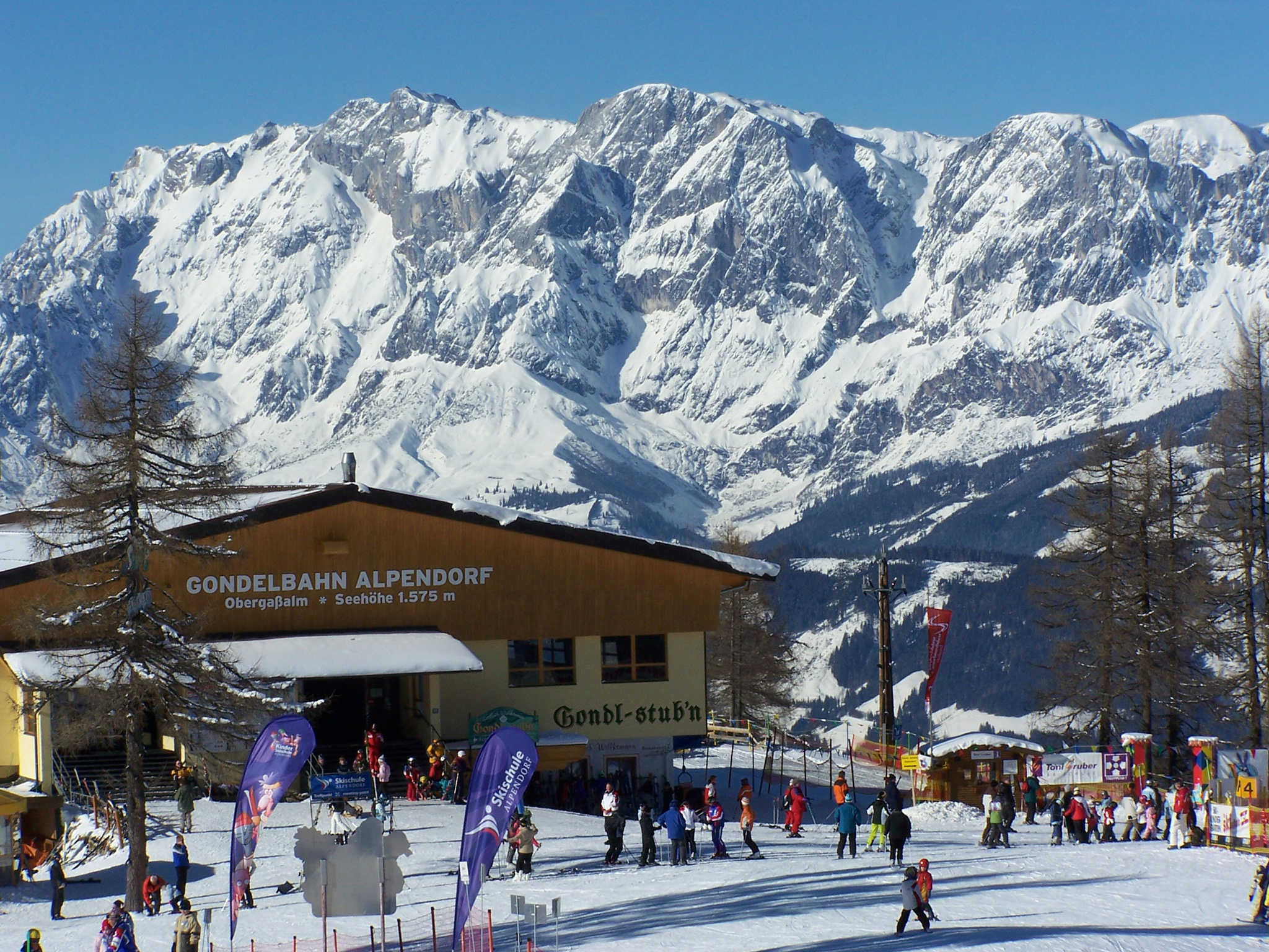 Obergaßalm, St.Johann - Alpendorf (Sportwelt Amadé)